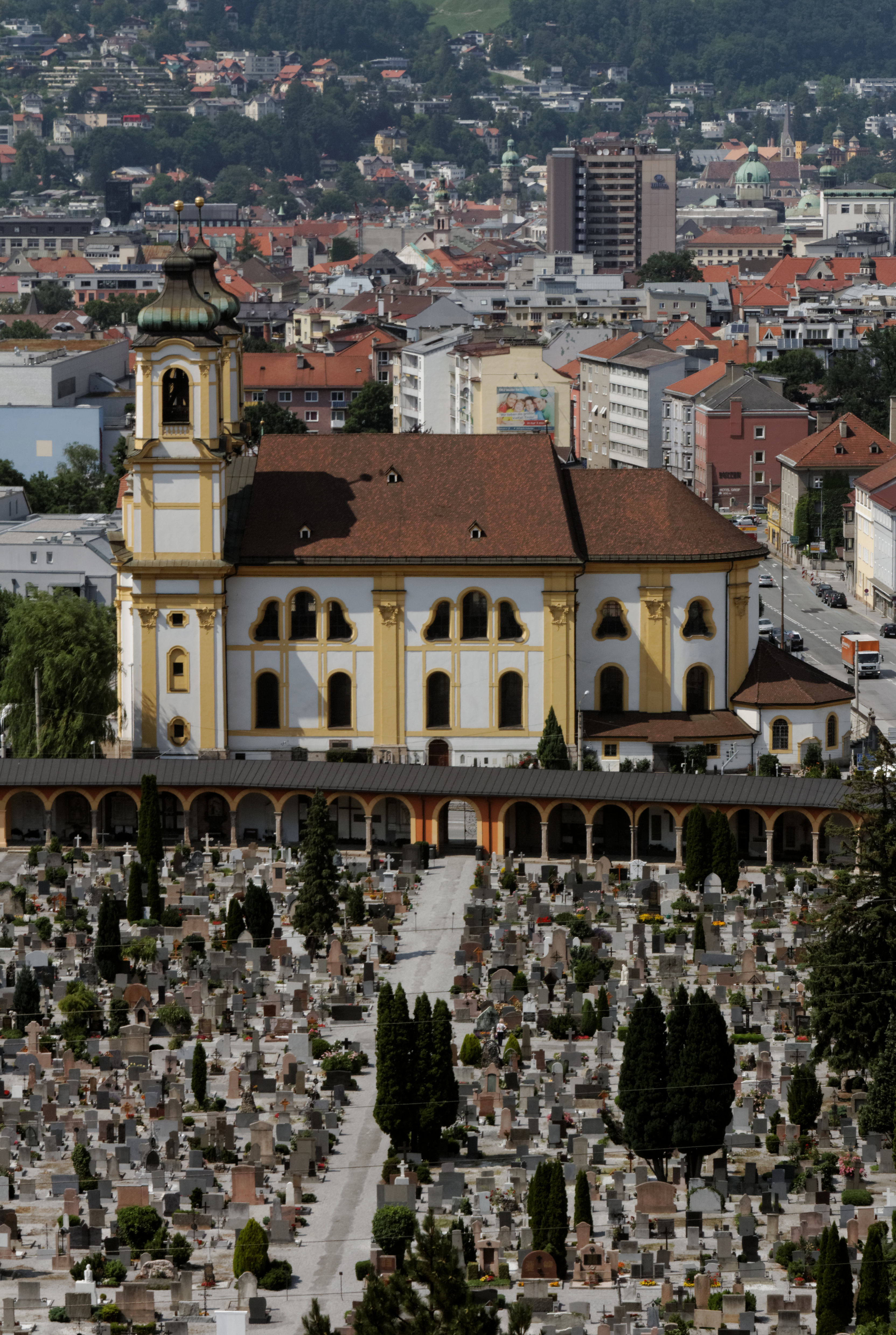 Basilika Unsere Liebe Frau von der unbefleckten Empfängnis Innsbruck-Wilten, vom Berg Isel gesehen